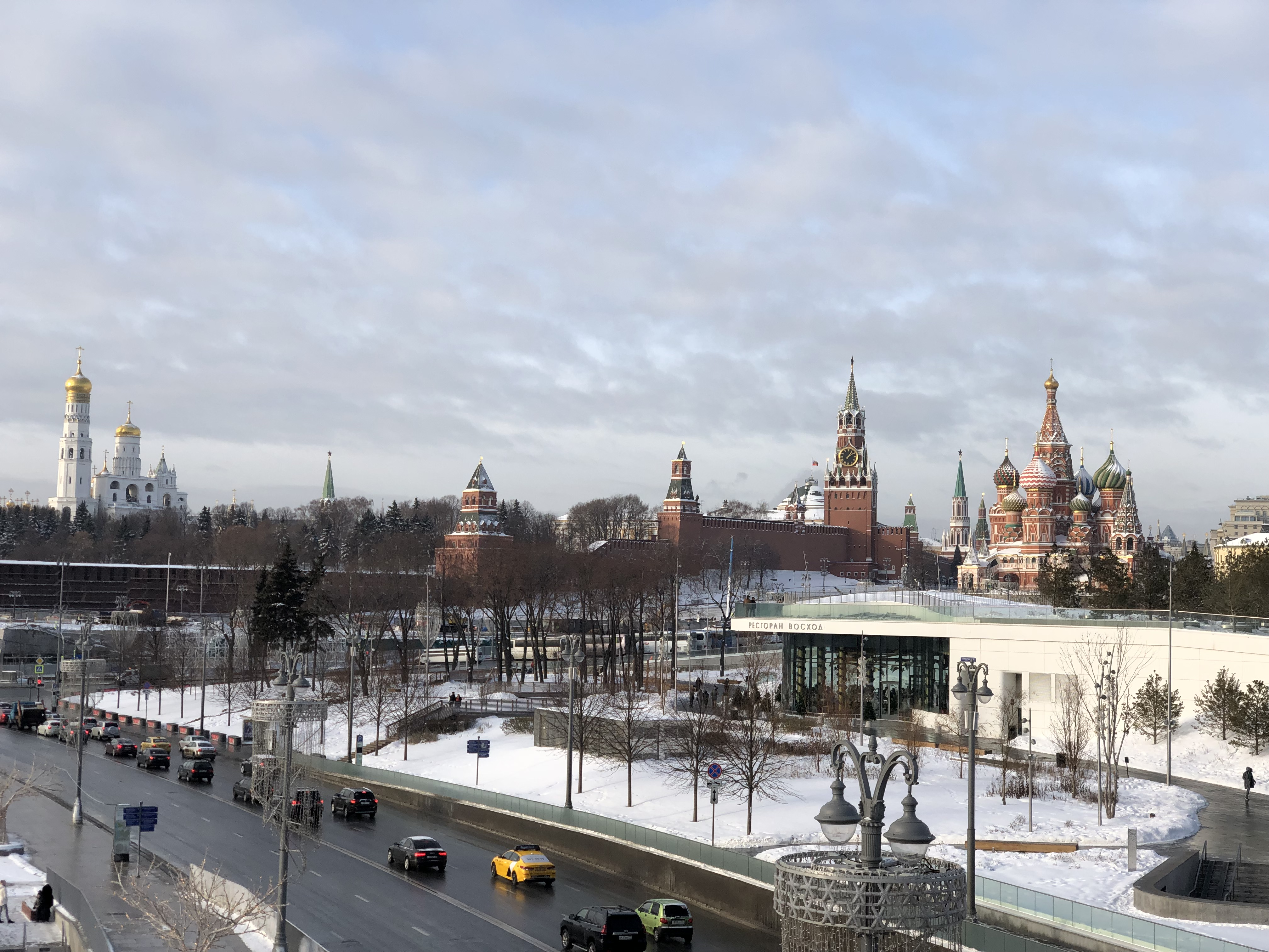 Московский кремль. Вид из Зарядья